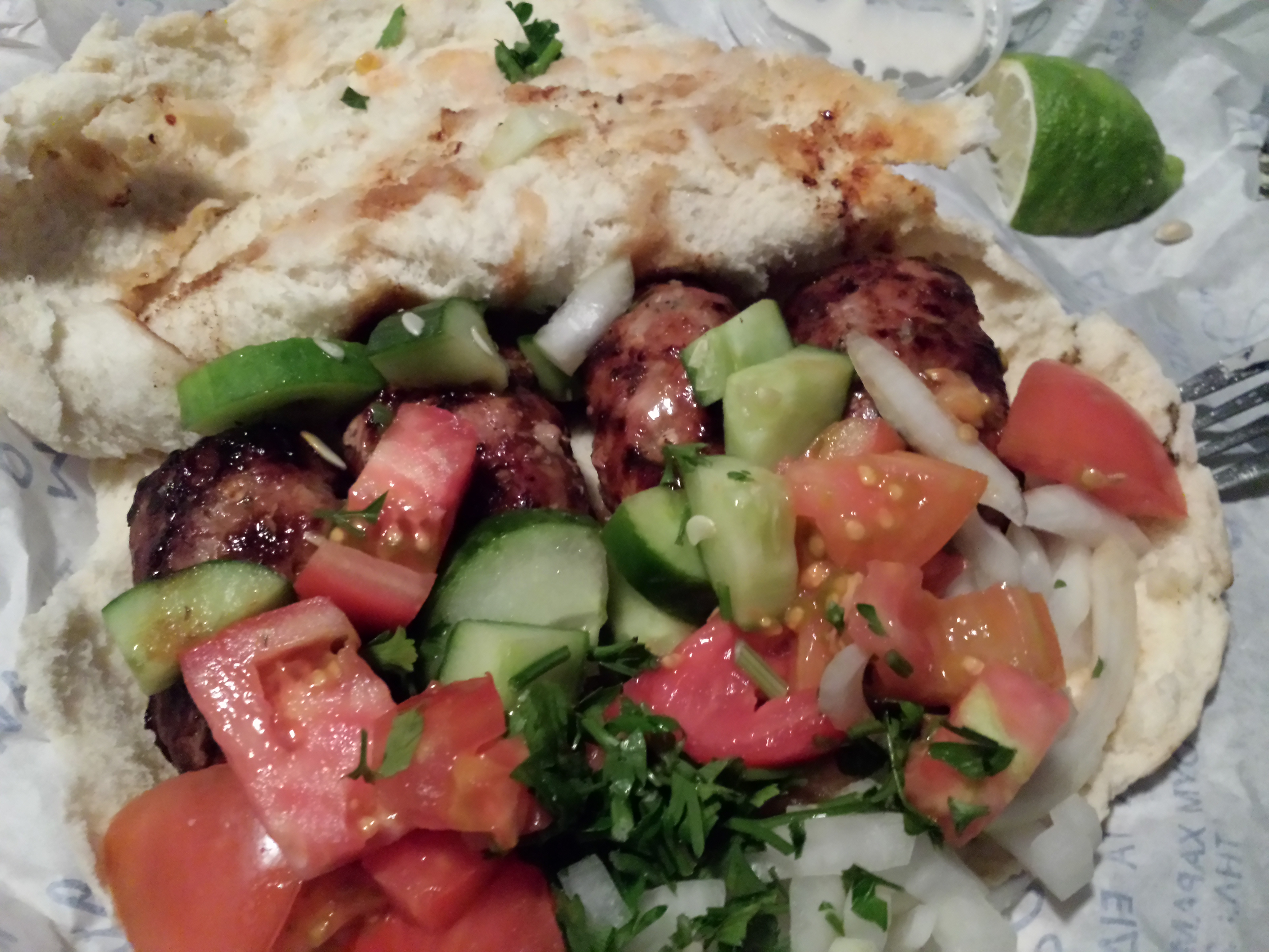 Sheftalies, serviert mit Gemüse in einer Pita